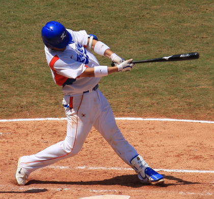 Kang Min-Ho